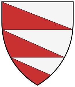 Batori ailəsinin gerbi